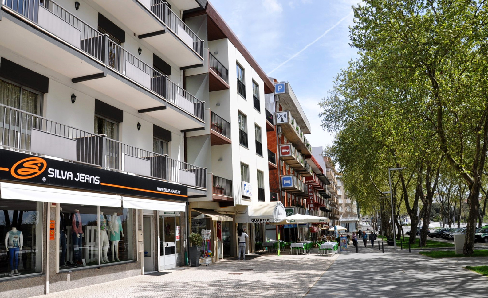 Fatima 0549